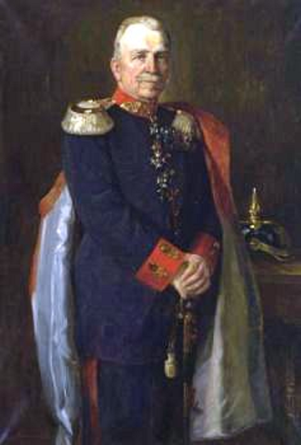 Viktor von Sproesser, 1853–1925, Herrenporträt des Generalleutnants